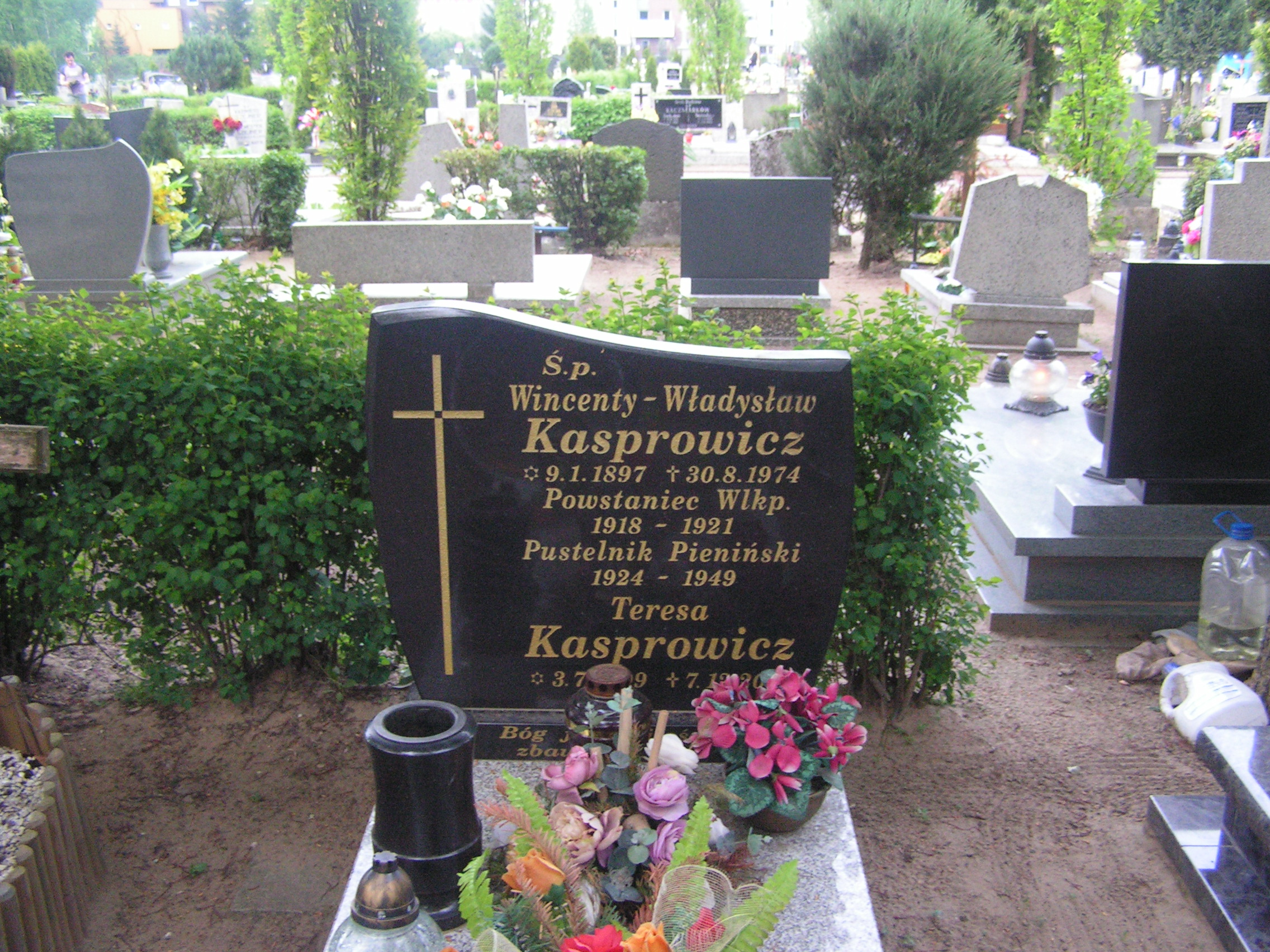 jeden z nagrobków